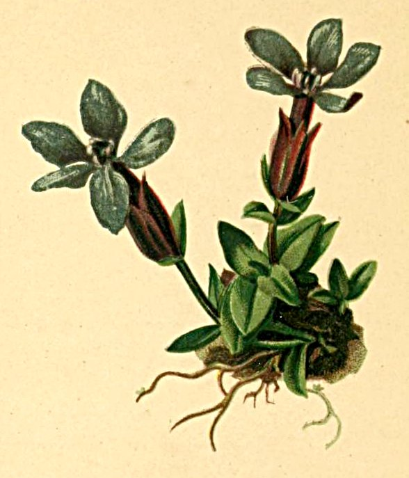 Gentiana verna subsp. pontica (syn. Gentiana angulosa)